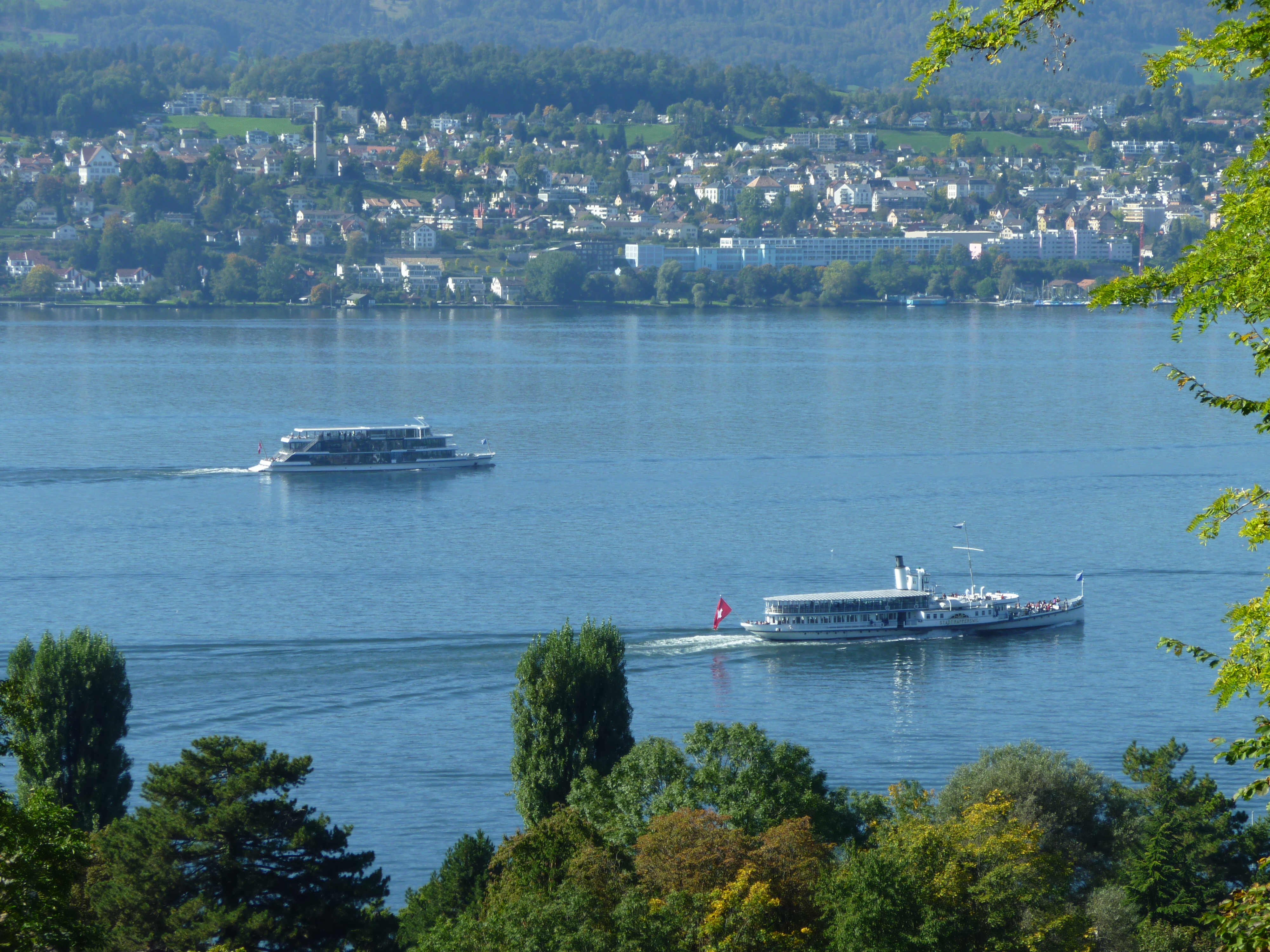 Dampfschiff Stadt Rapperswil und Panta Rhei auf dem Zürichsee